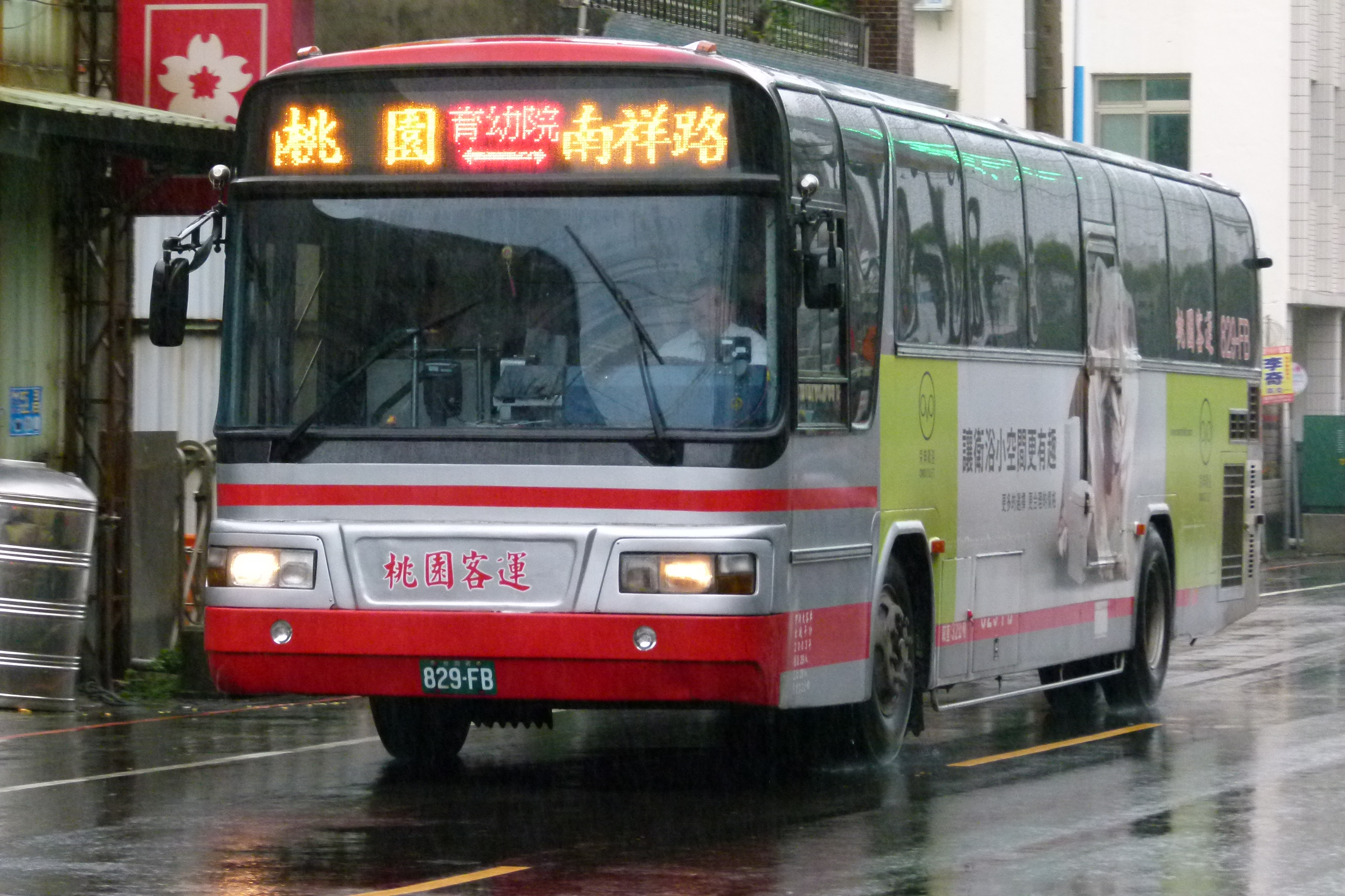 雨中的桃園客運2003年大客車829-FB。